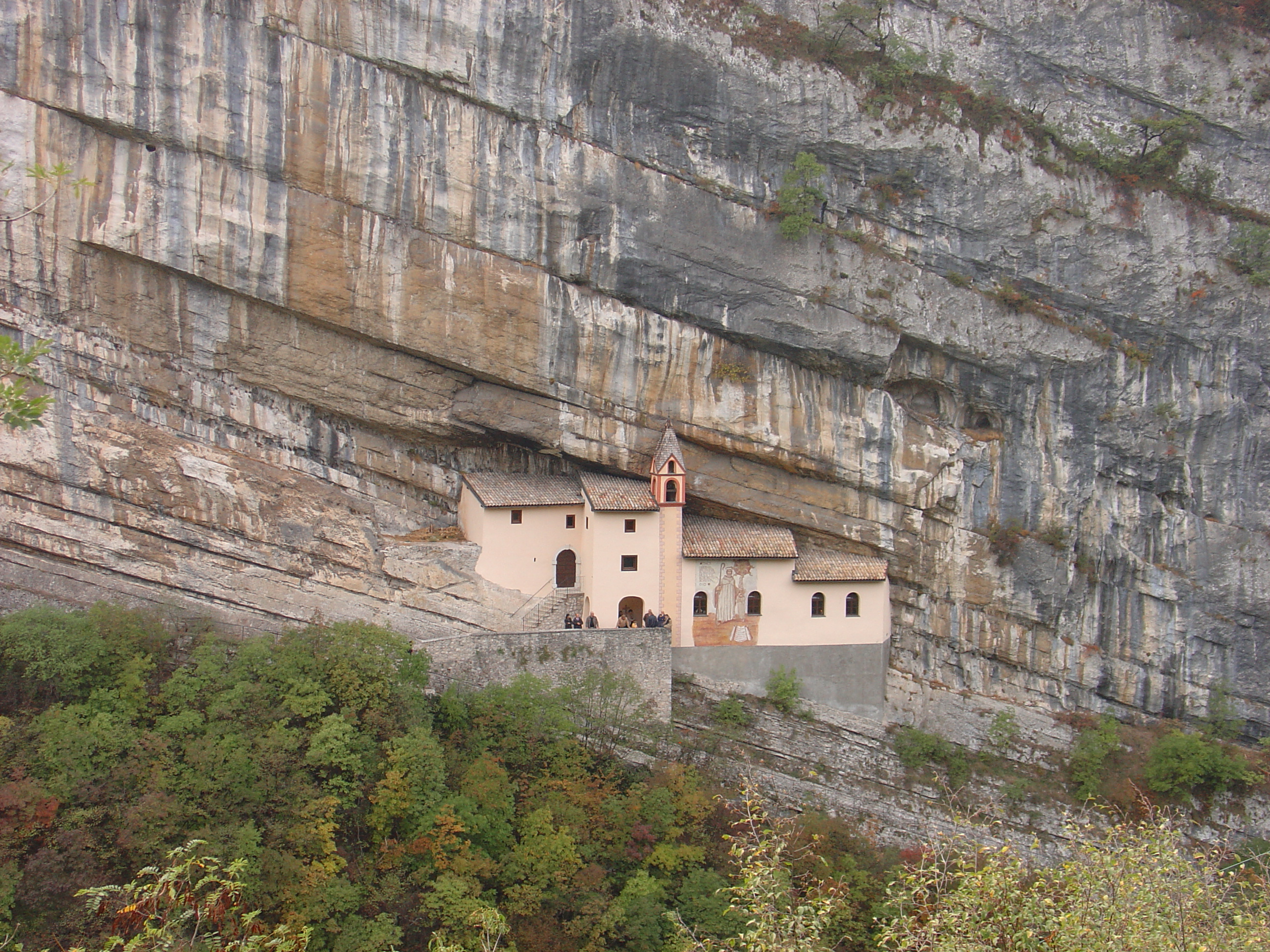 L'eremo di San Colombano a Trambileno, Trento, Italia. Ho preso questa foto il 13 Ott 2003 dalla strada che passa vicino.